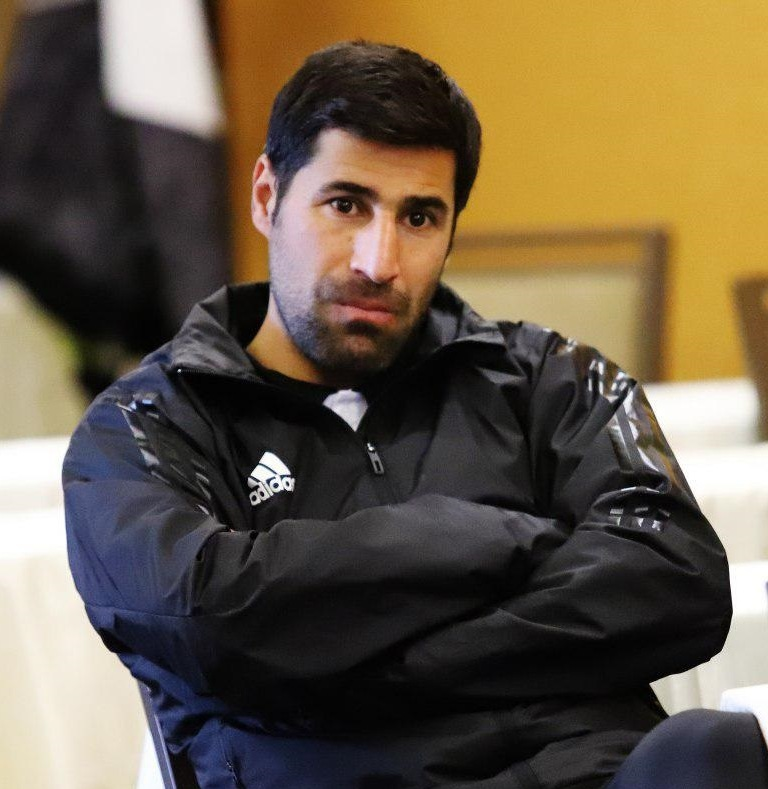 تصاویر مرحله دوم کلاس مربیگری B آسیا در تهران به مدرسی امیر حسین پیروانی با حضور ستارگان سابق فوتبال مثل تیموریان، جباری، حیدری،‌عمران‌زاده، بیک‌زاده و بنگر